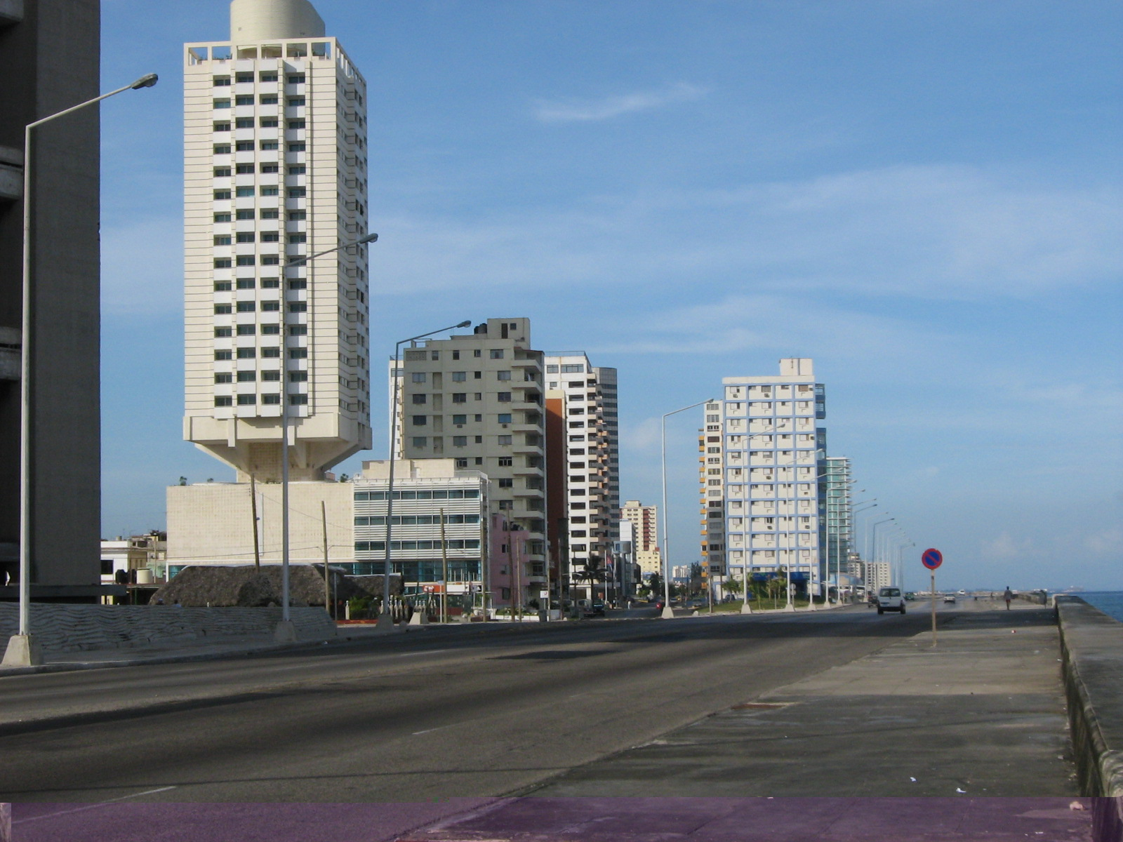 Vista del Malecón de La Habana